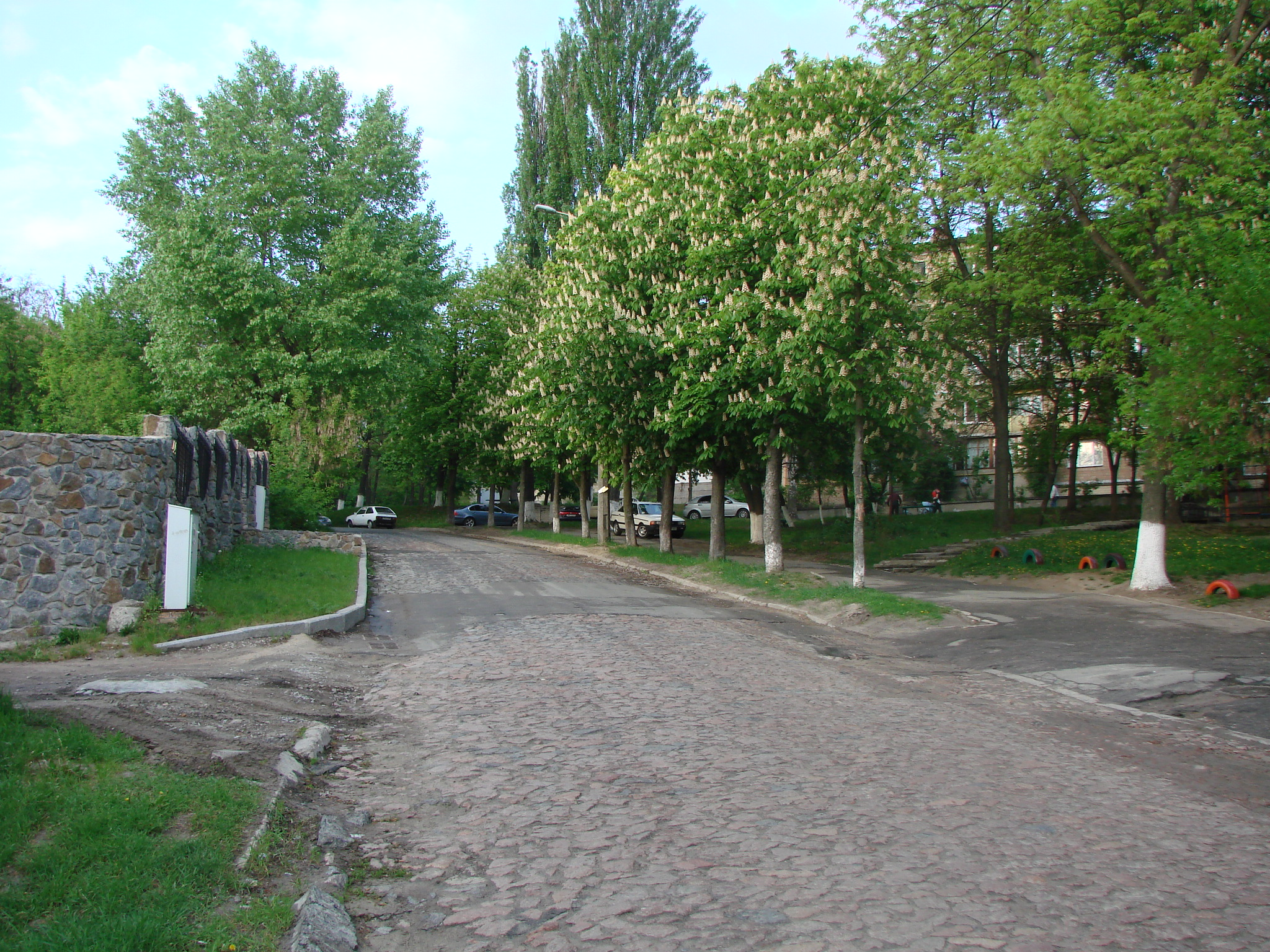 Вулиця Котовського у Шевченківському районі у Києві